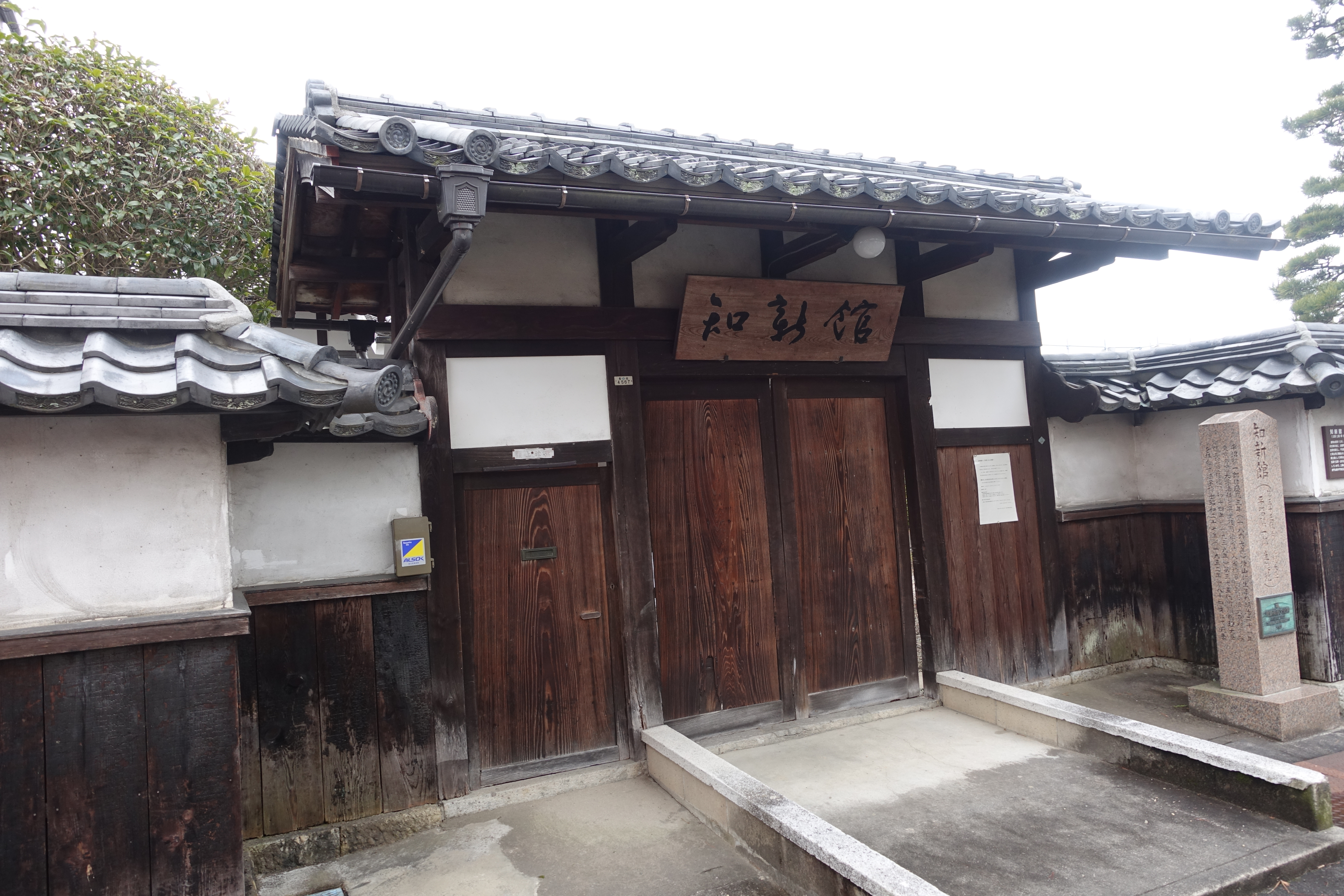 第35代内閣総理大臣を務めた平沼騏一郎の旧別邸。現在は知新館として利用されている。